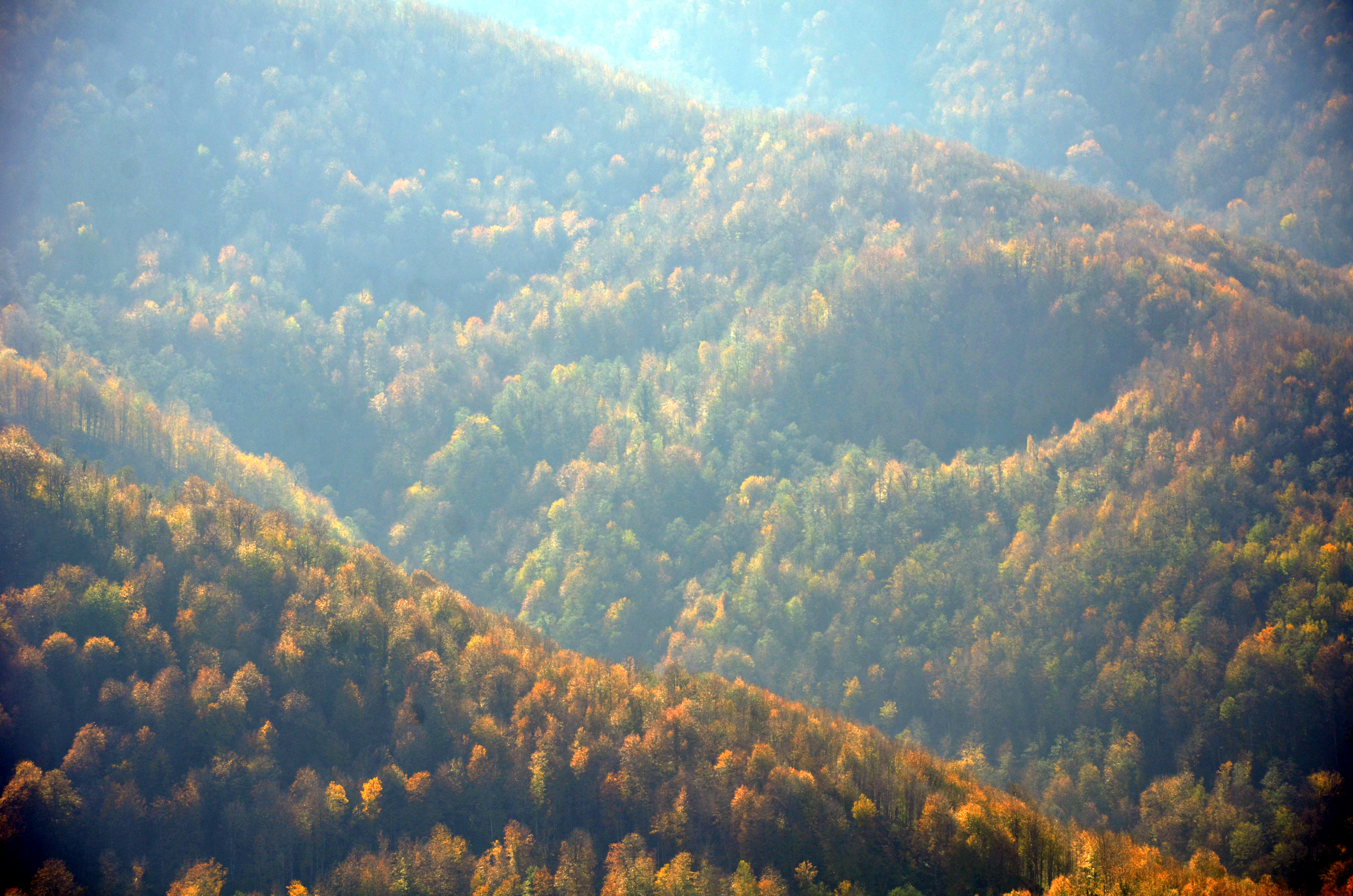 Gilan - Deylaman Forest